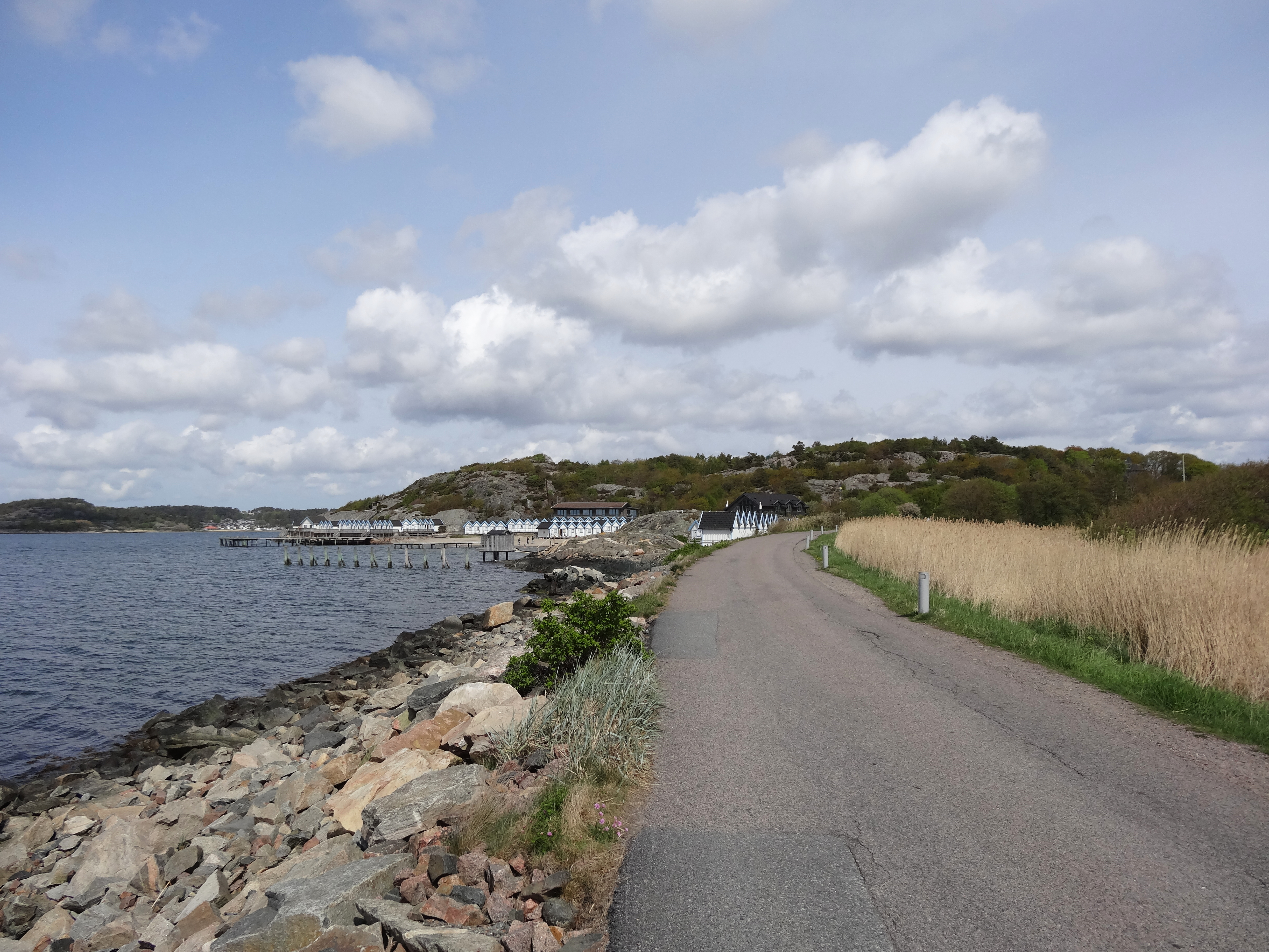 Gång- och cykelbana längs havet i Järkholmen (Hovås) i Göteborg.